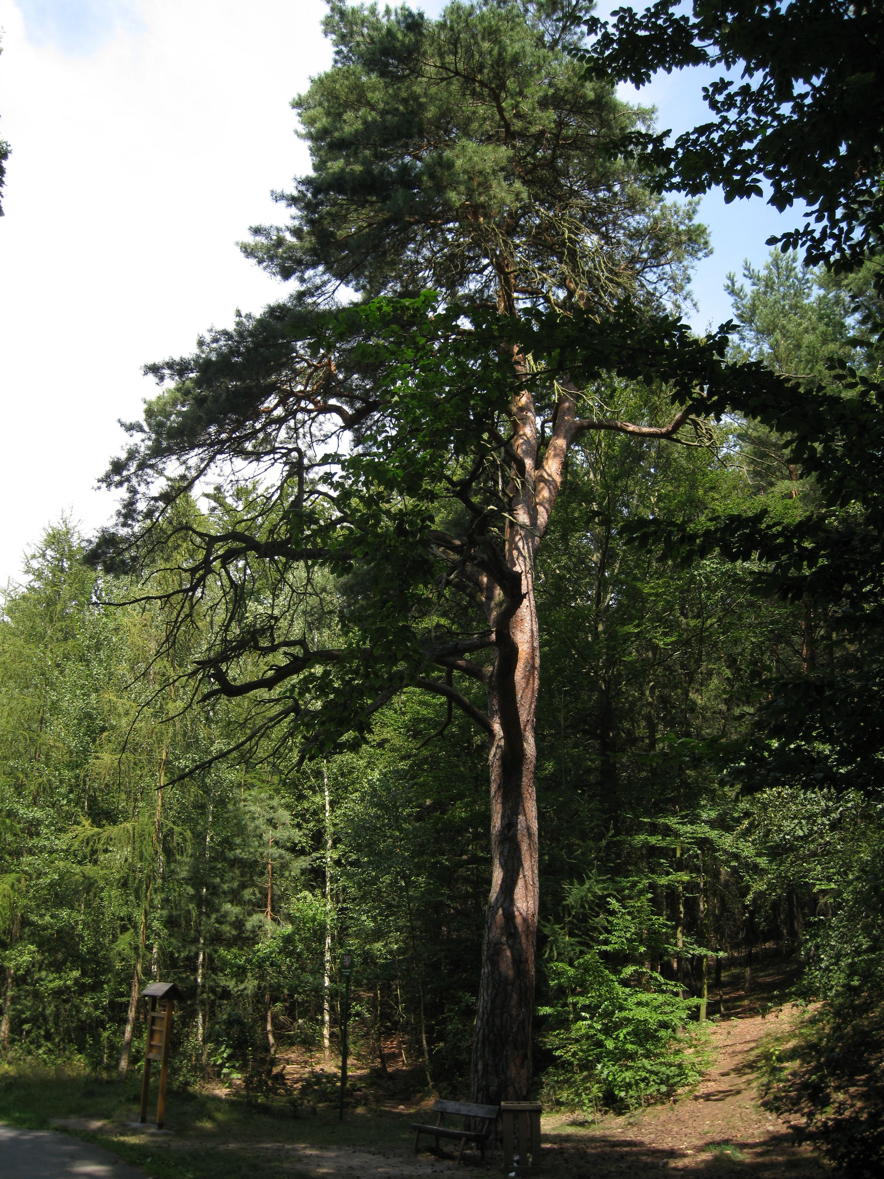 Borovice u rybníka Košinář v Plzni. Státem chráněný strom.